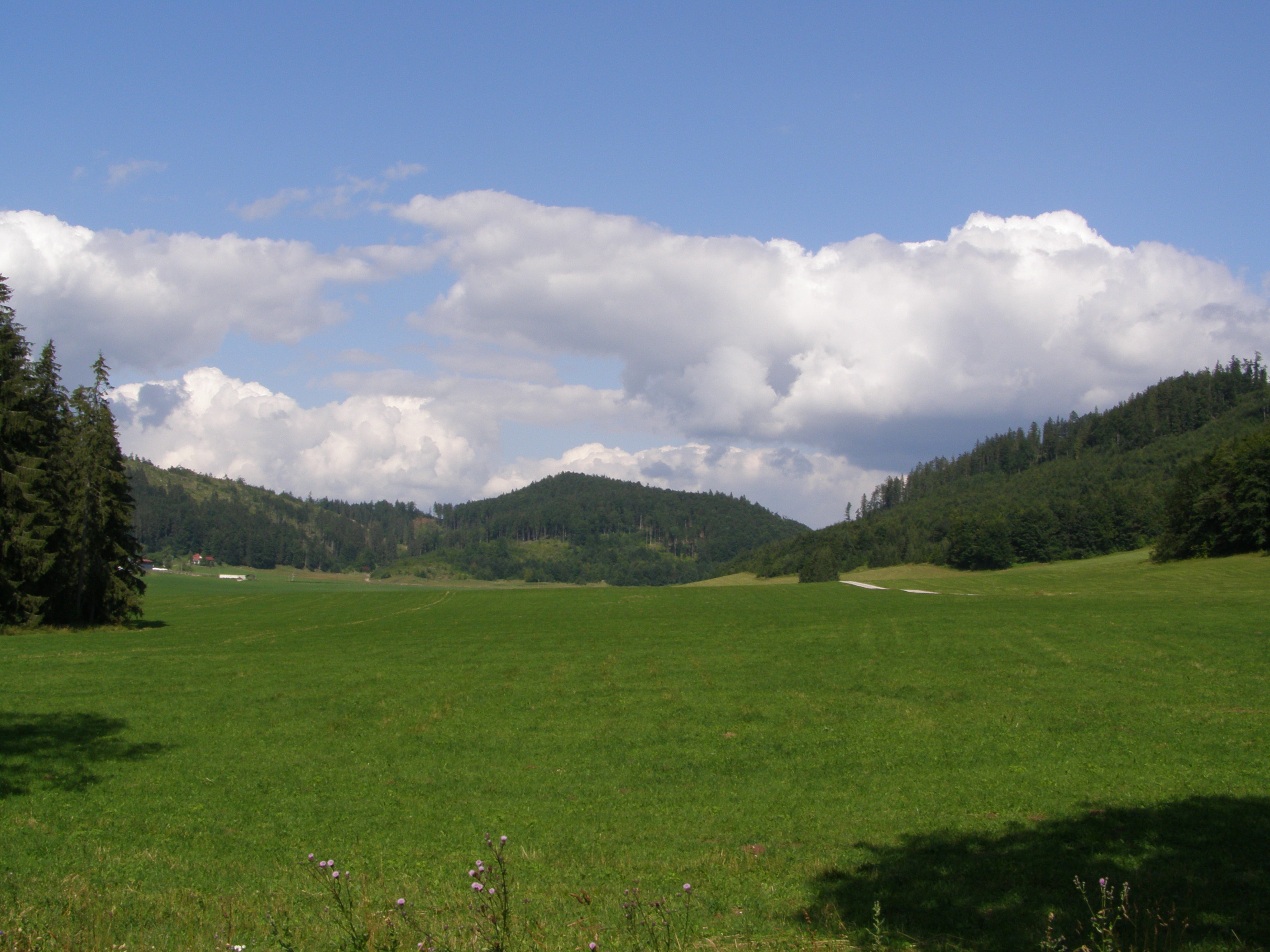 Slovenské rudohoří, Spišsko-gemerský kras, Muráňská planina, lokalita Veľká lúka, pohled od jihozápadu